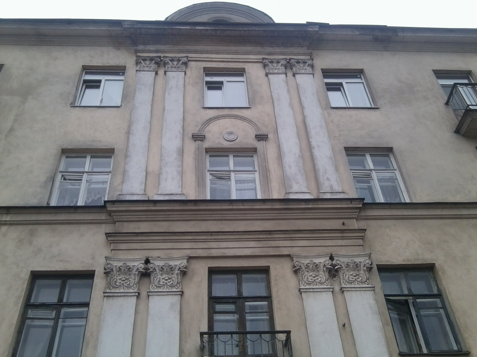 Архитектура по улице Будённого в Минске